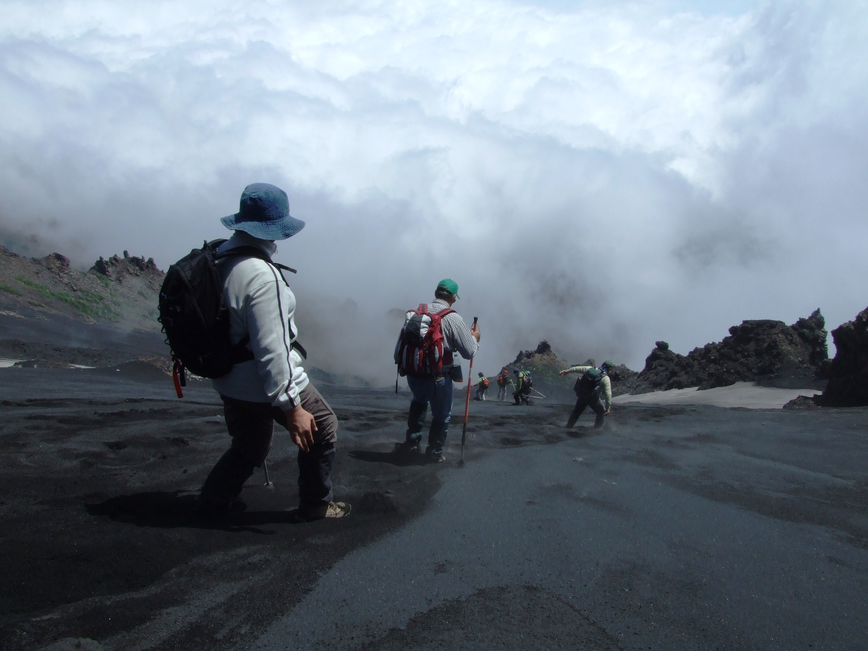 ETNA (discesa ripida - Steepest descent)